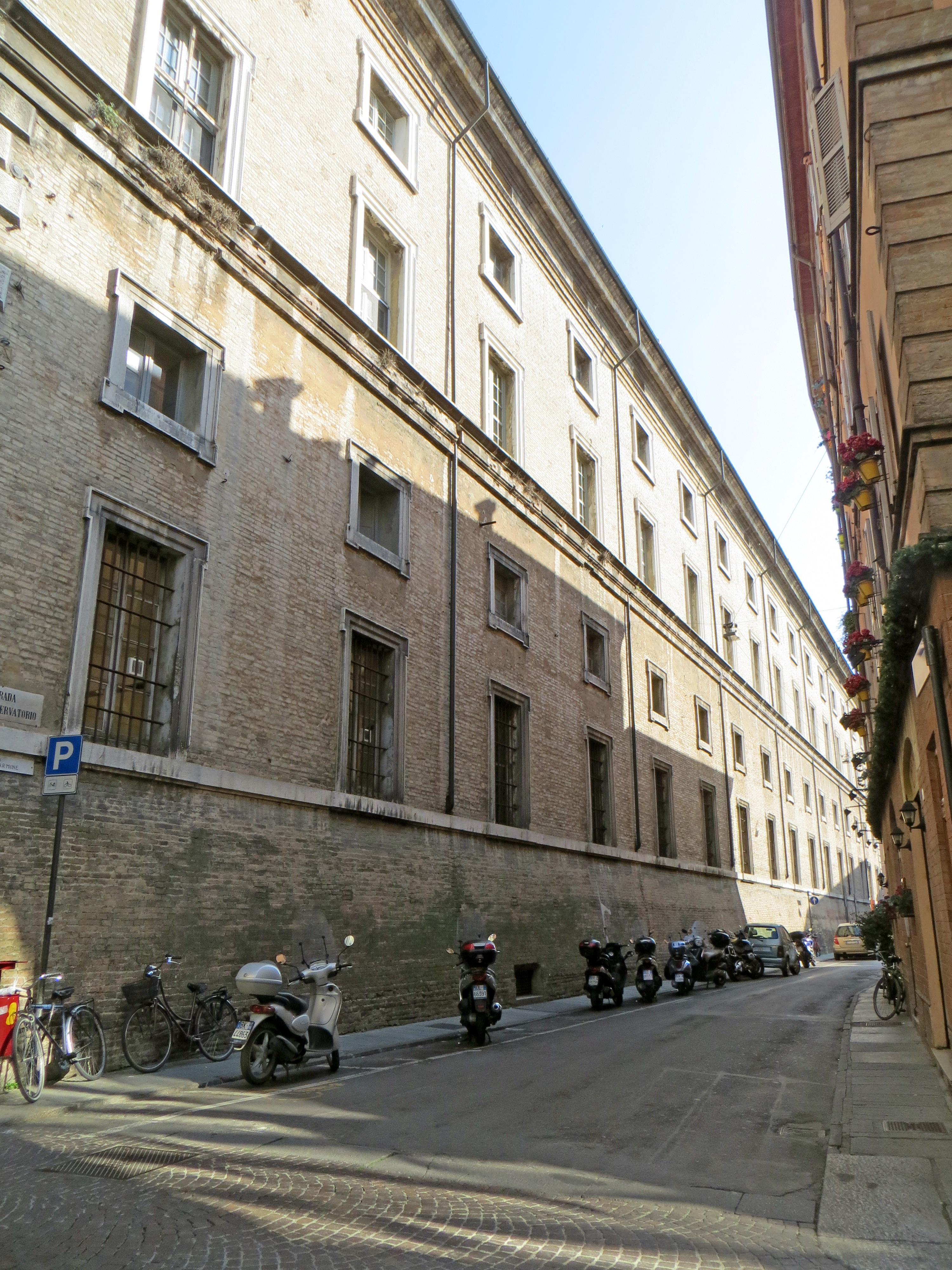 Palazzo dell'Università di Parma - facciata laterale